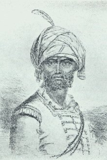 Hyder Ali